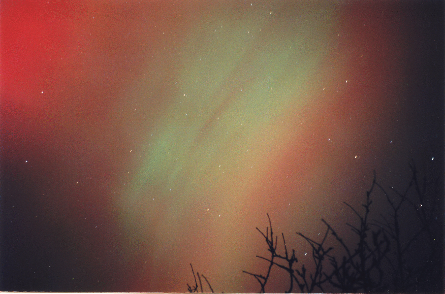 Virmalised Eesti taevas.